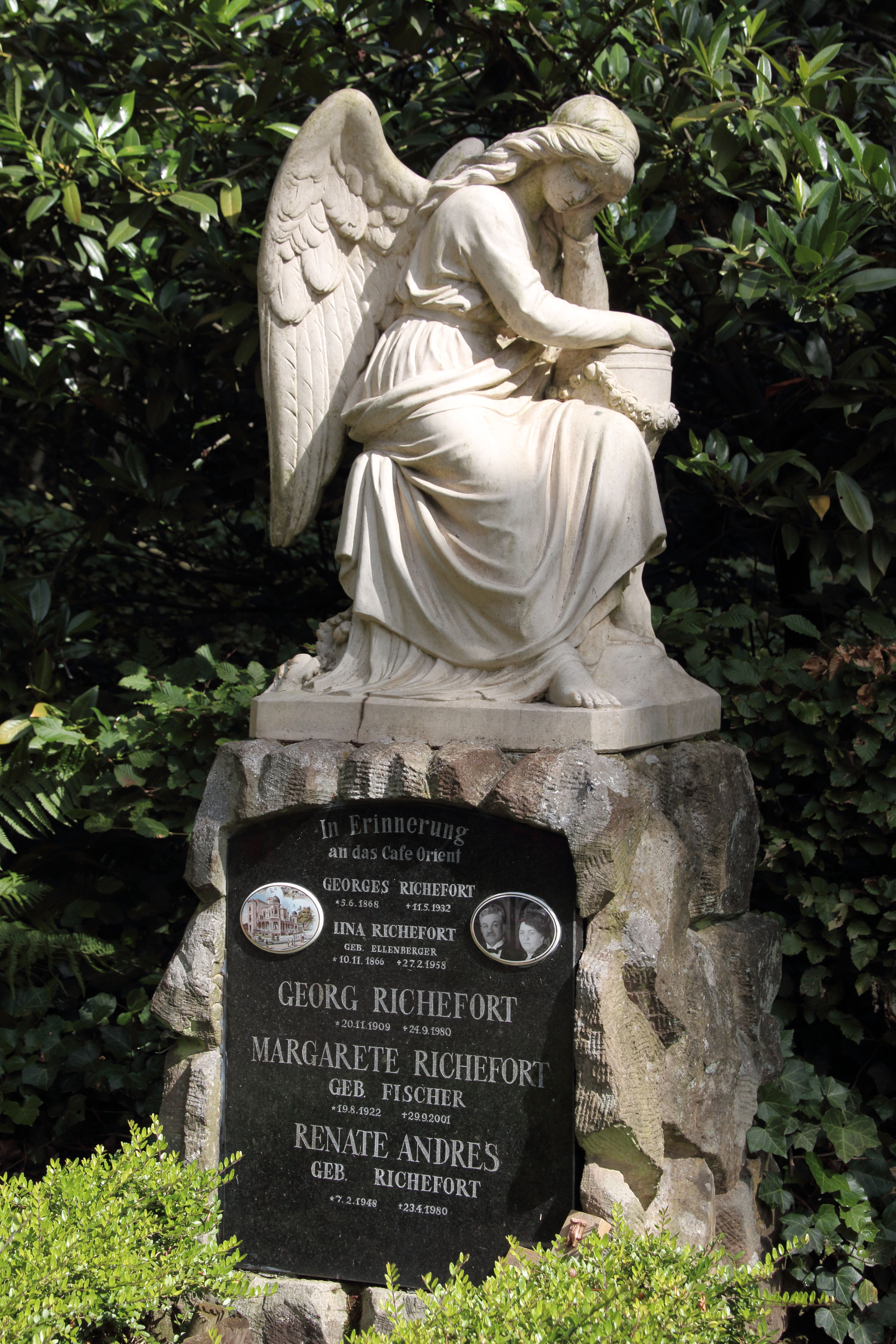 Grabmal Georges Richefort (1868-1932) und Lina Richefort geb. Ellenberger (1866-1958), Betreiber des Café Orient in Wiesbaden. Nordfriedhof Wiesbaden.